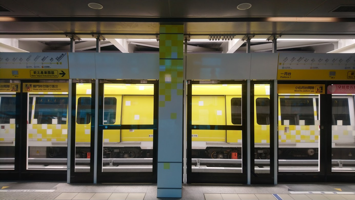 台北捷運頭前庄站環狀線第一月台，月台門與環狀線電聯車塗裝(公共藝術第一區)